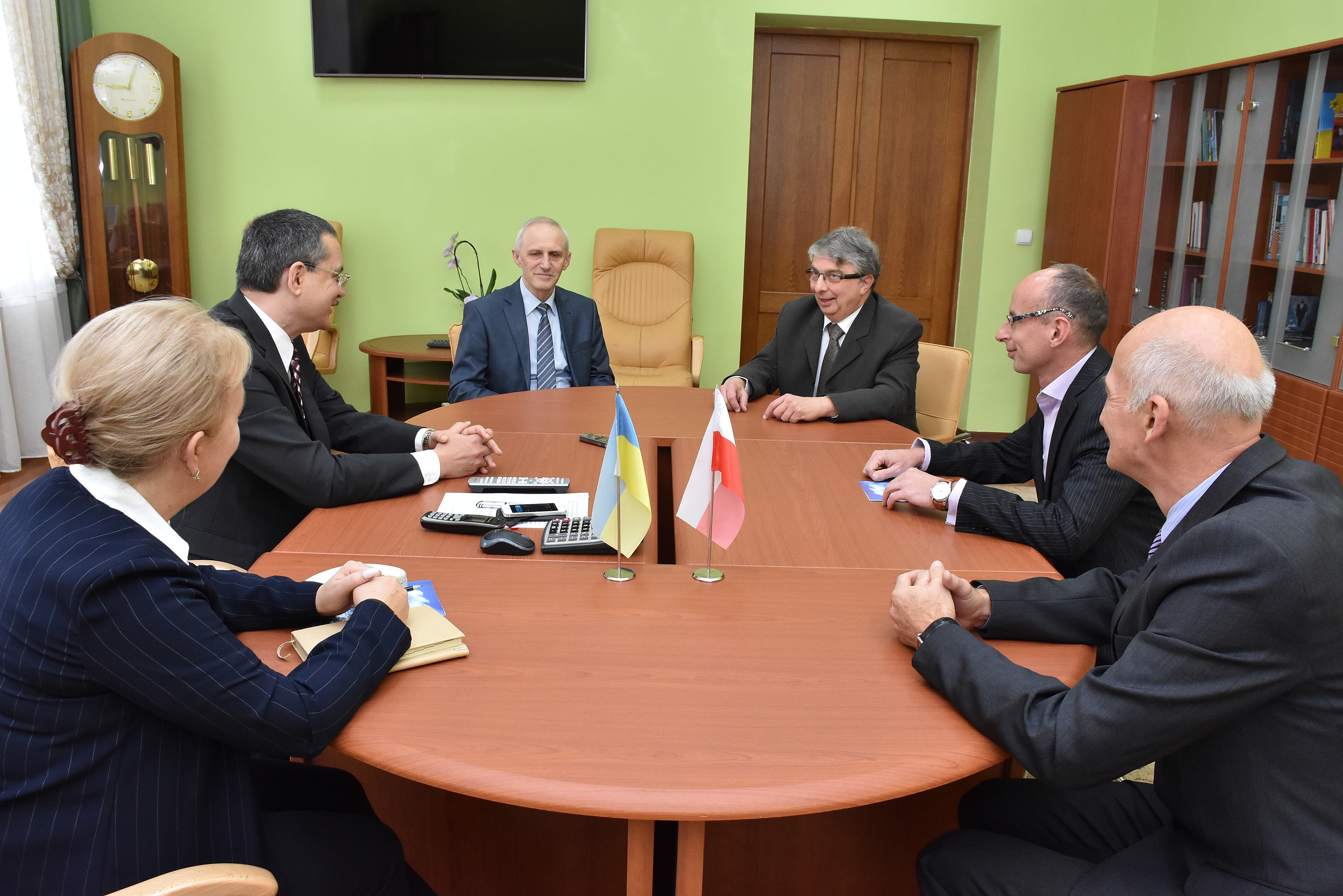 Науковець Вроцлавського медичного університету, почесний професор Тернопільського державного медичного університету імені І. Я. Горбачевського Войцех Барг із візитом у ТДМУ 22 вересня 2016 року. Зліва направо: Наталія Лісничук, ректор ТДМУ, професор Михайло Корда, проректор ТДМУ, професор Іван Кліщ, почесний професор ТДМУ Войцех Барг, професори ТДМУ Ігор Господарський і Леонід Грищук.